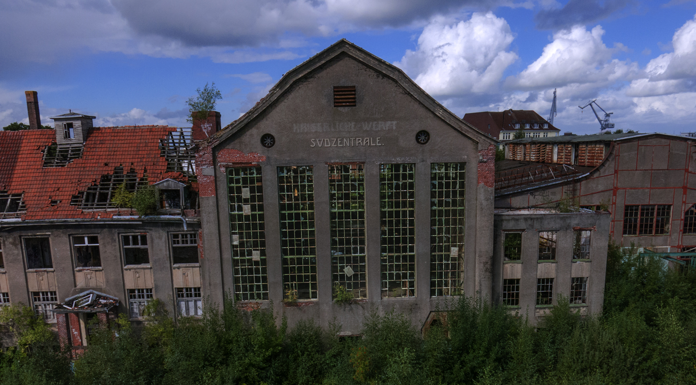 Südzentrale